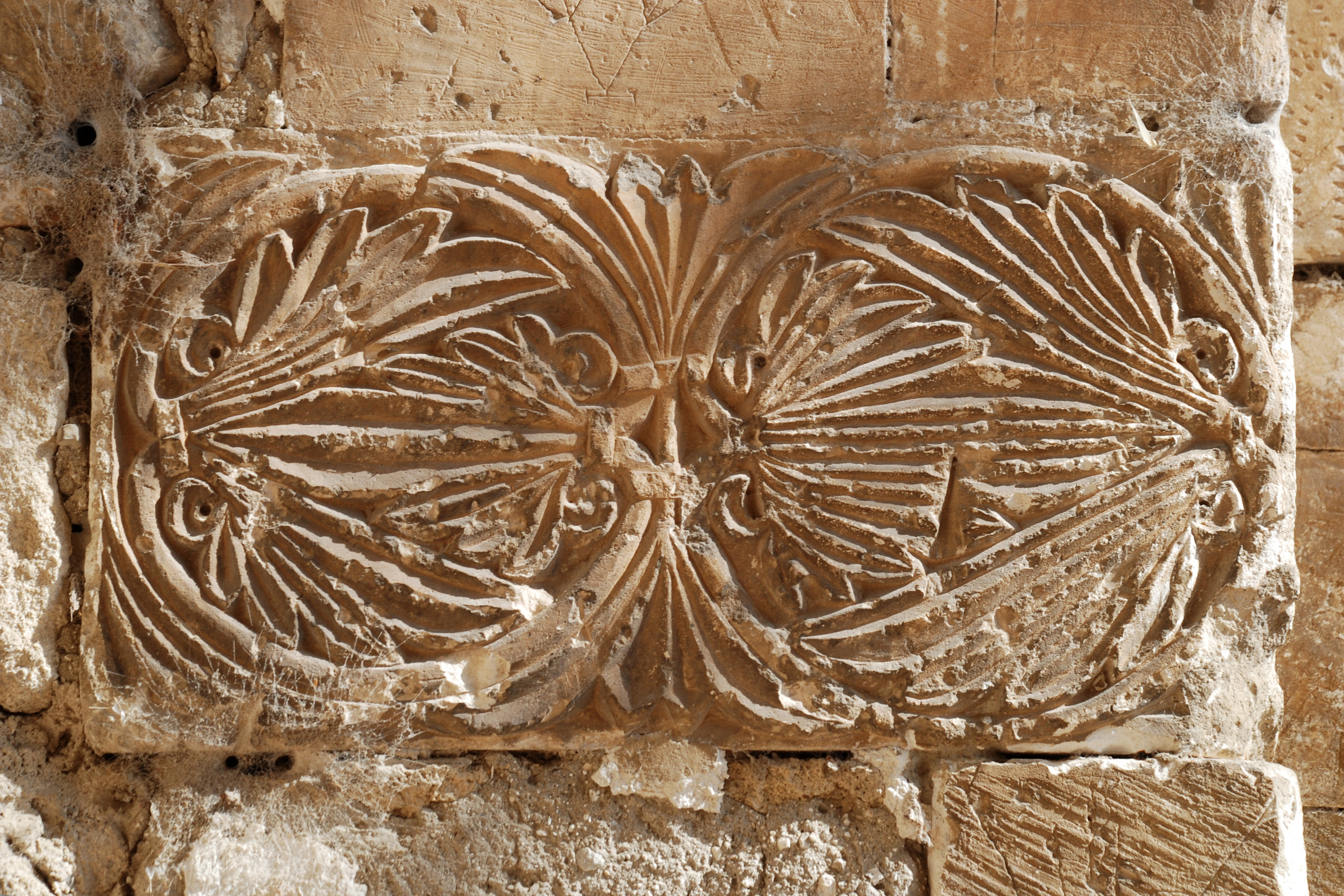 France - Provence - Chapelle Saint-Véran d'Orgon